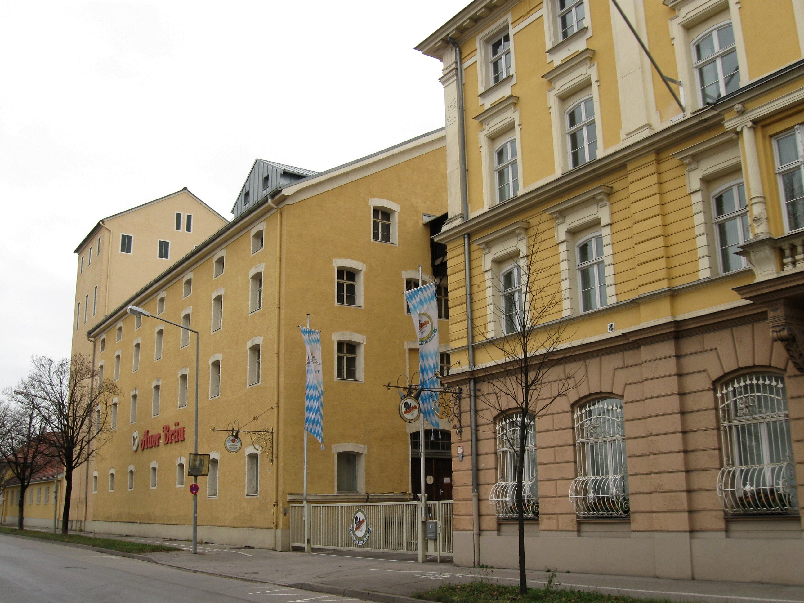 Münchener Straße 80/82; Verwaltungs- und Sudhausgebäude des Auerbräu (Nr. 80), stattlicher viergeschossiger traufständiger Bau mit Satteldach und reicher historisierender Fassadengliederung, am ersten Obergeschoss Erker, Hauseingang bez. 1889, rückwärtig Sudhaus einbezogen; östlich angeschlossen Gär- und Lagerkeller, mehrstöckiger, horizontal gegliederter Satteldachbau, im Kern 1889/90, mit jüngeren Ausbauten; westlich abgerückt ehem. Mälzerei (Nr. 82), dreigeschossiger traufständiger Satteldachbau mit Mezzanin, Keller- und Erdgeschoss gewölbt, darüber Lagerböden mit hölzerner Binnenkonstruktion, 1889.